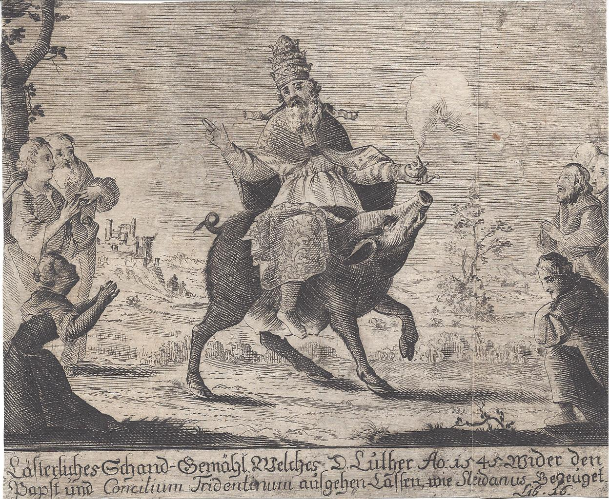 Lästerliches Schand-Gemähl (Der Papst auf reitet auf einer Sau), aus "Friss Vogel oder stirb" von Johannes Nicolaus Weislinger, 1726. Katholische Gegenpropaganda auf den reformatorischen Holzschnitt: Papa dat Concilium in Germania, Cranach Werkstatt, verlegt in Nürnberg 1545 mit einem Text Luthers.